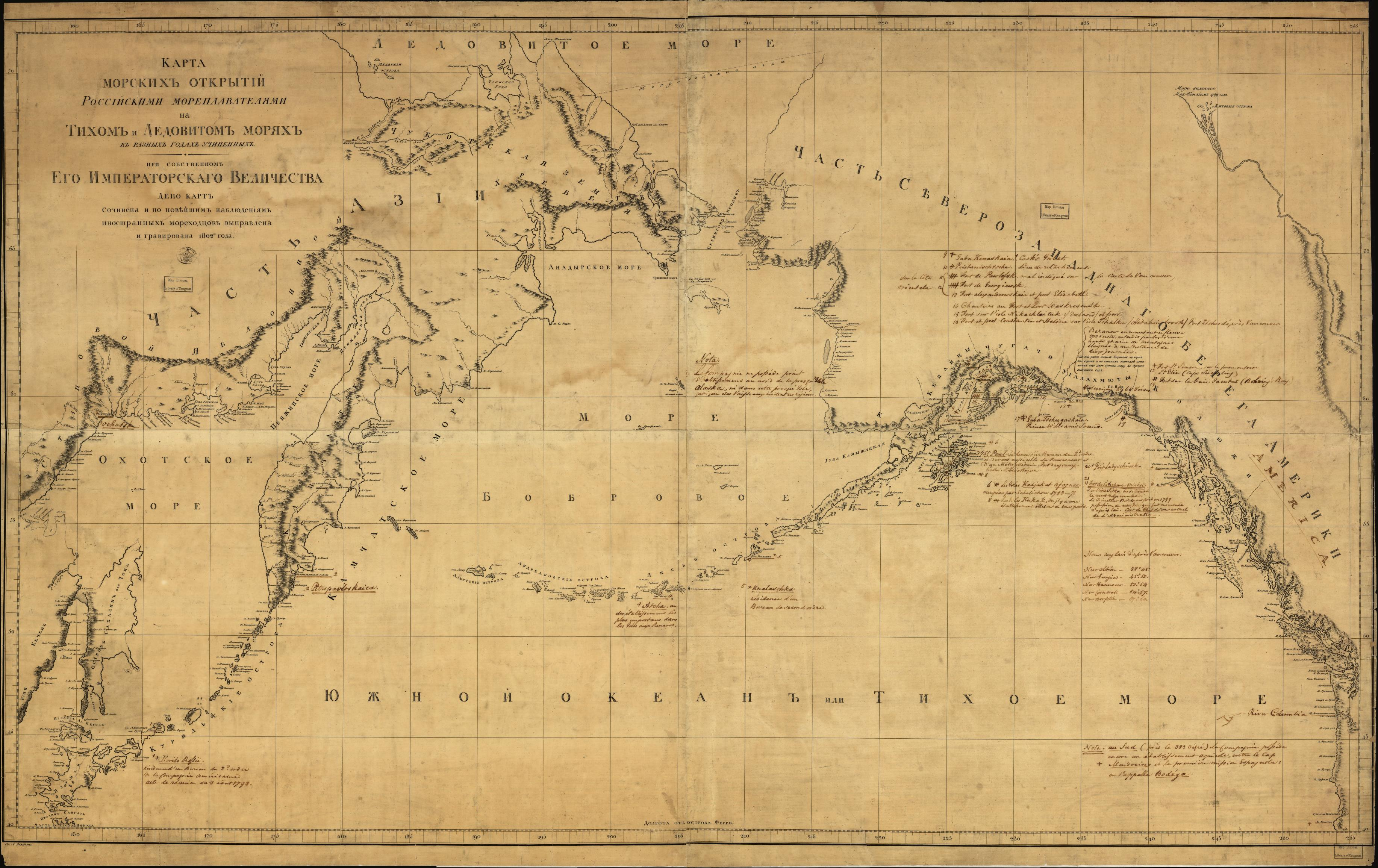 Карта морских открытий российскими мореплавателями на Тихом и Ледовитом морях в разных годах учиненных. При собственном Его Императорскаго Величества. Сочинена и по новейшим наблюдениям иностранных мореходцов выправлена и гравирована